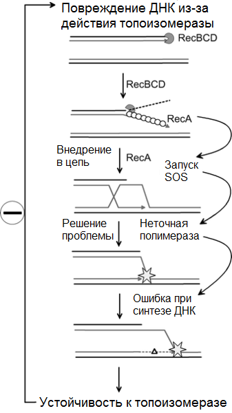 SOS response antibiotic resistance in russian